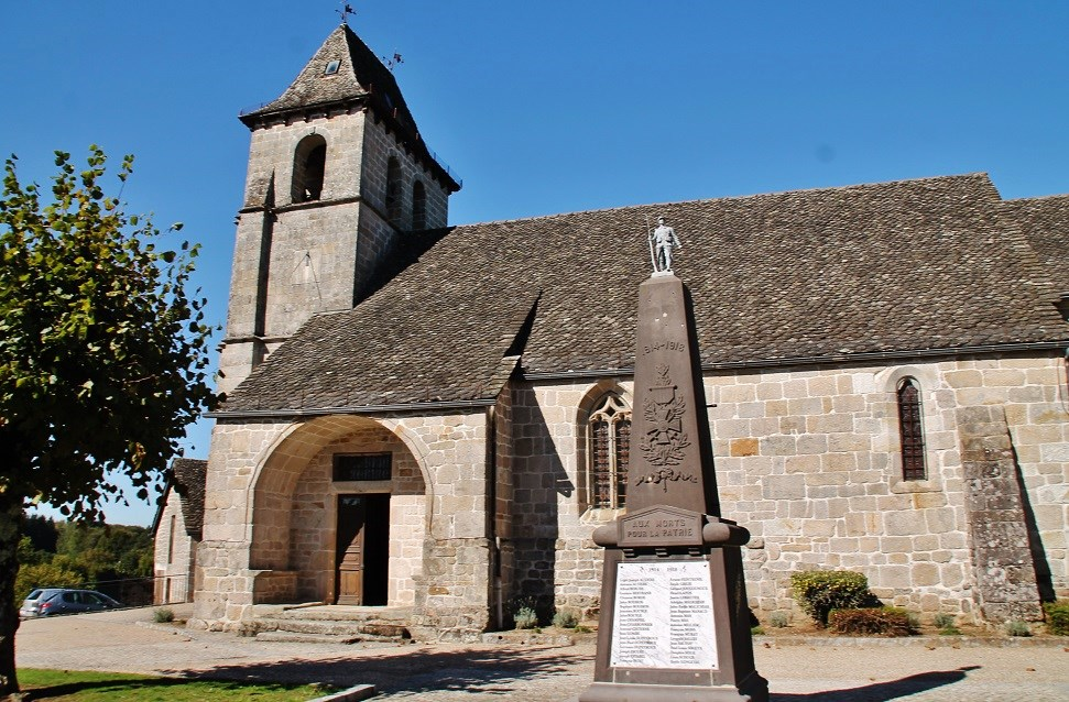 église St Etienne et le Monument-aux-Morts